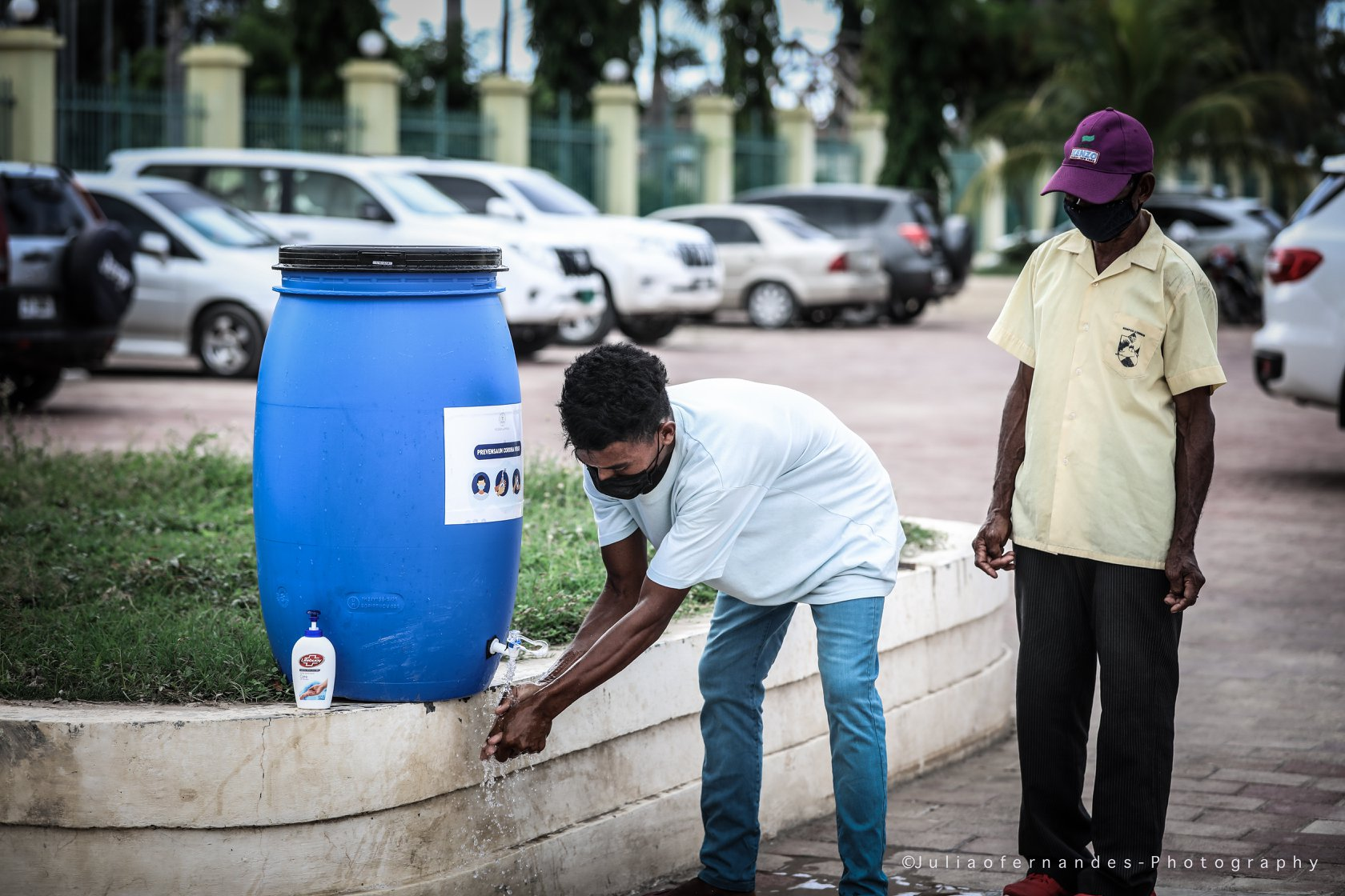 Präventionsmaßnahmen am Präsidentenpalast Osttimors